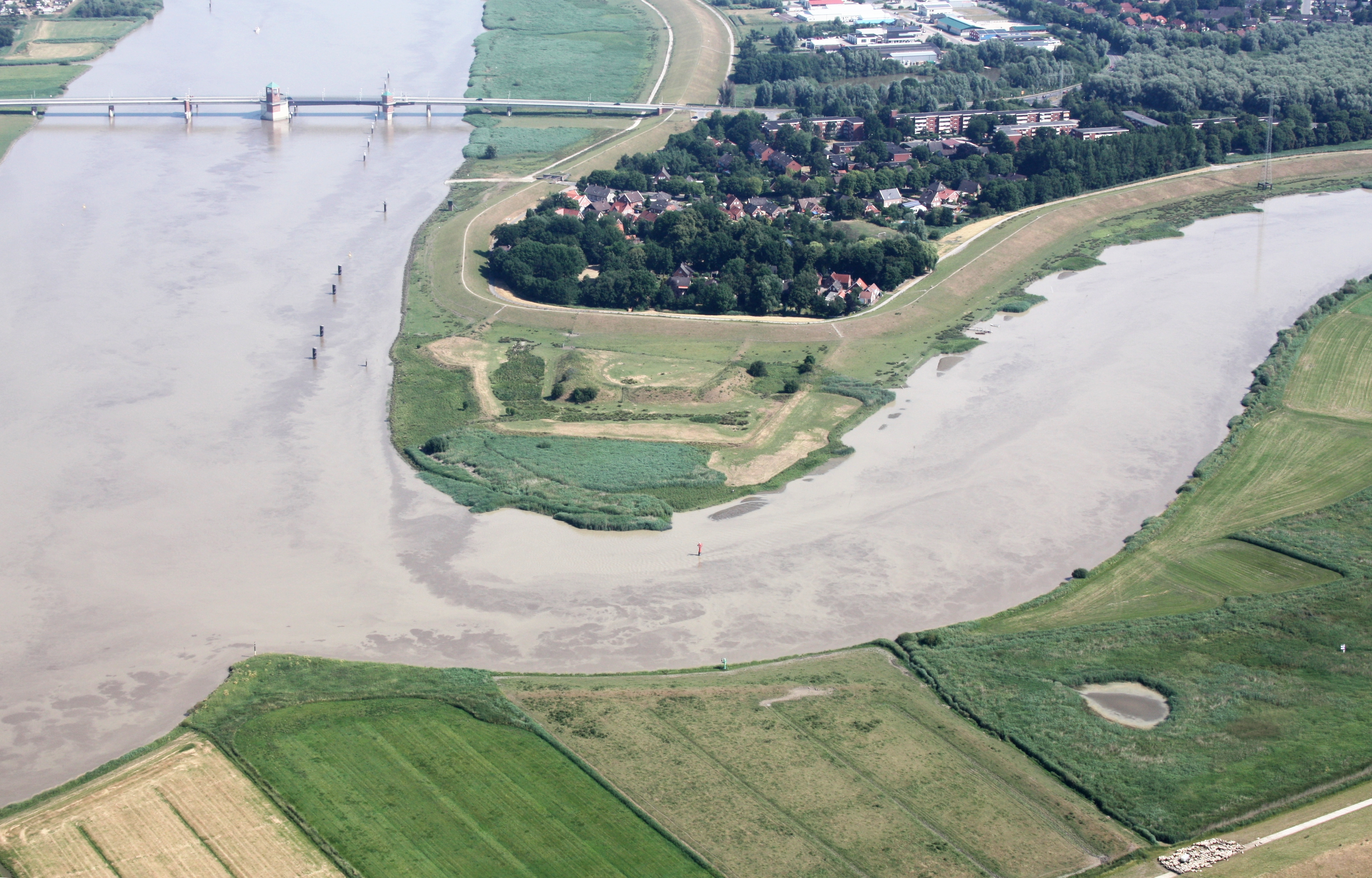 Luftaufnahme; Flug von Westerstede nach Leer; Flughöhe 1500 ft; Juli 2010; Originalfoto bearbeitet: Tonwertkorrektur und Bild geschärft mit Hochpassfilter